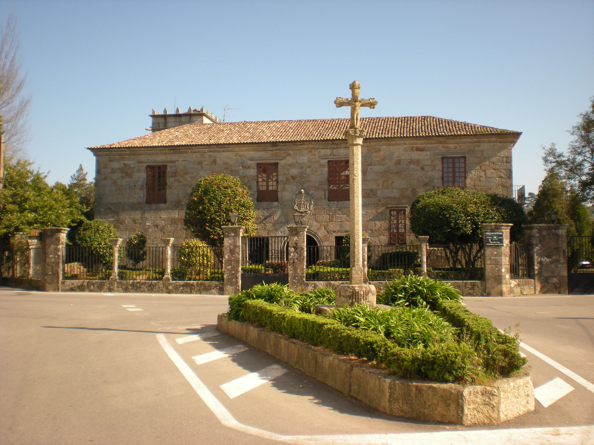 Pazo de Ulloa en el centro de Cambados